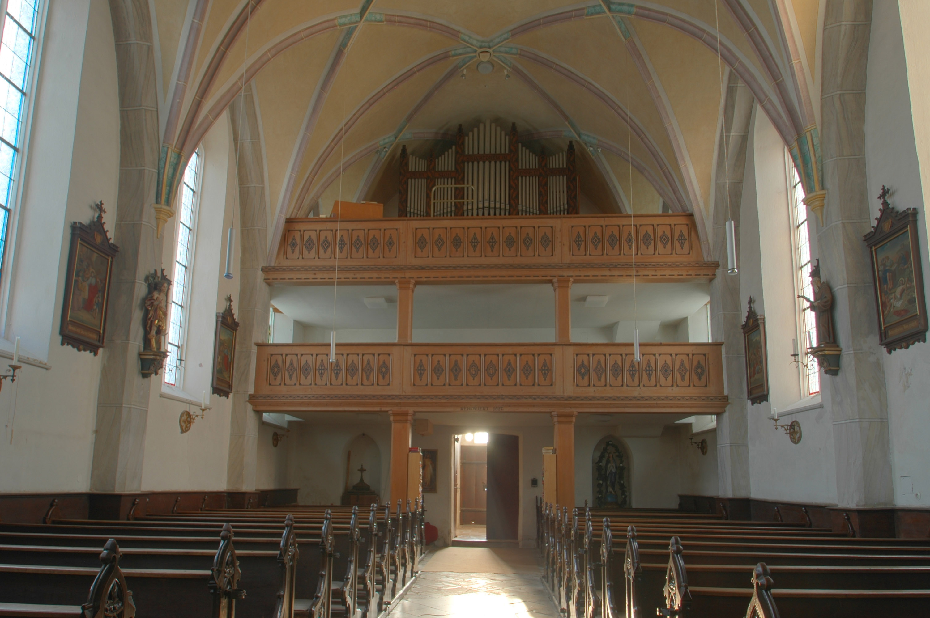 Kath. Pfarrkirche St. Vigilius Kirchdorf a. Haunpold (Bruckmühl); spätgotische Anlage, um 1470, teilweise barockisiert 1697.This is a photograph of an architectural monument.